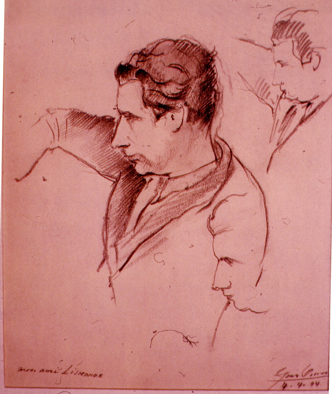 le peintre belge Jules Lismonde, 1944, dessin par Léon van Dievoet, architecte.